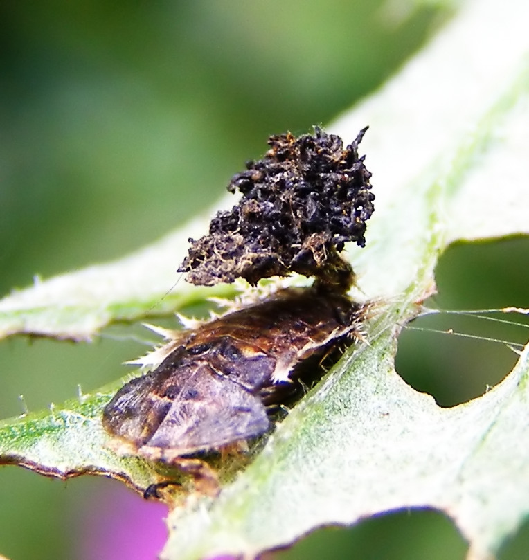 Schildkäferlarve (Cassida viridis)mit Exkrementen als Tarnung